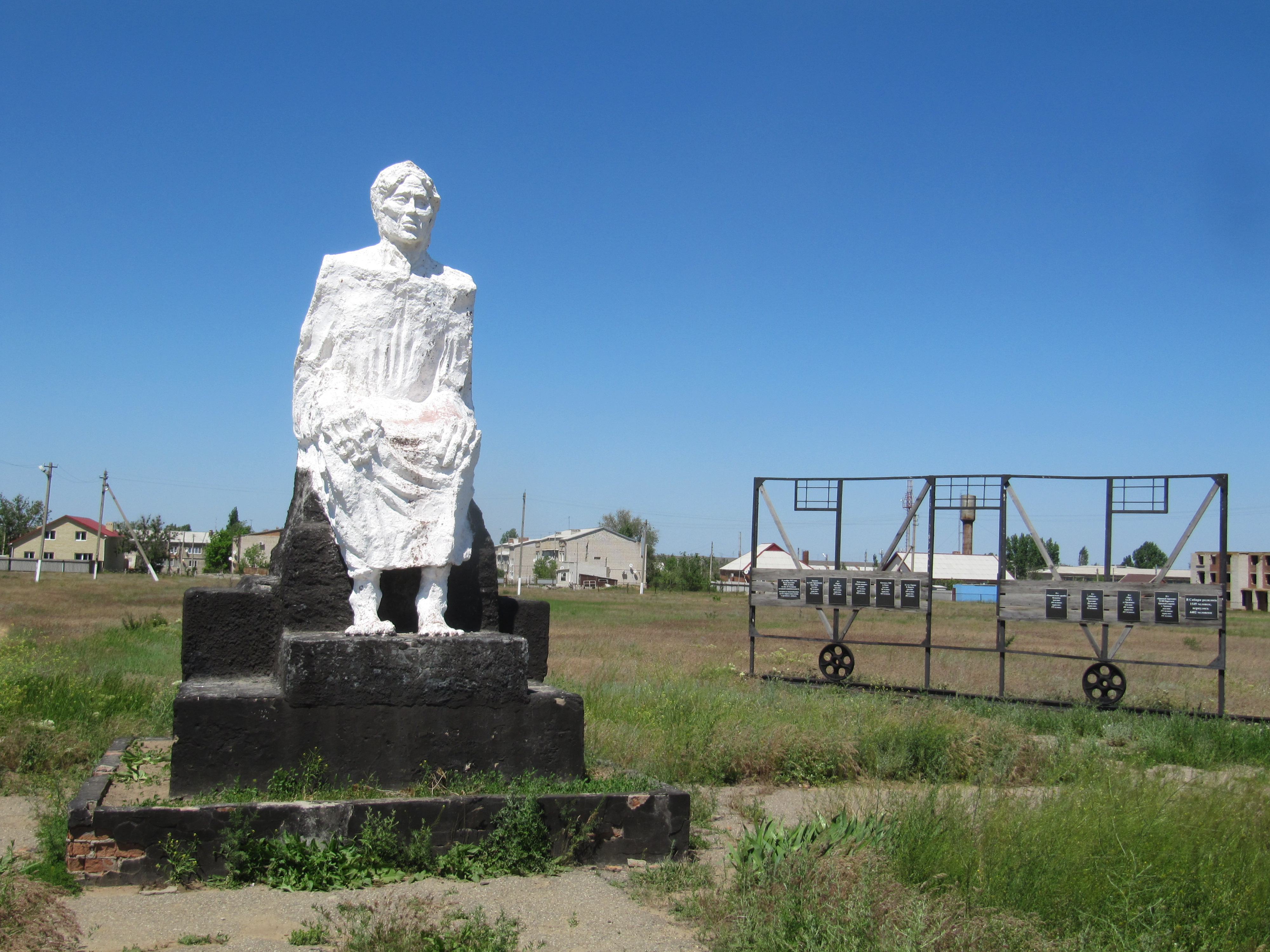 Мемориал жертвам депортации калмыков, село Троицкое, Республика Калмыкия